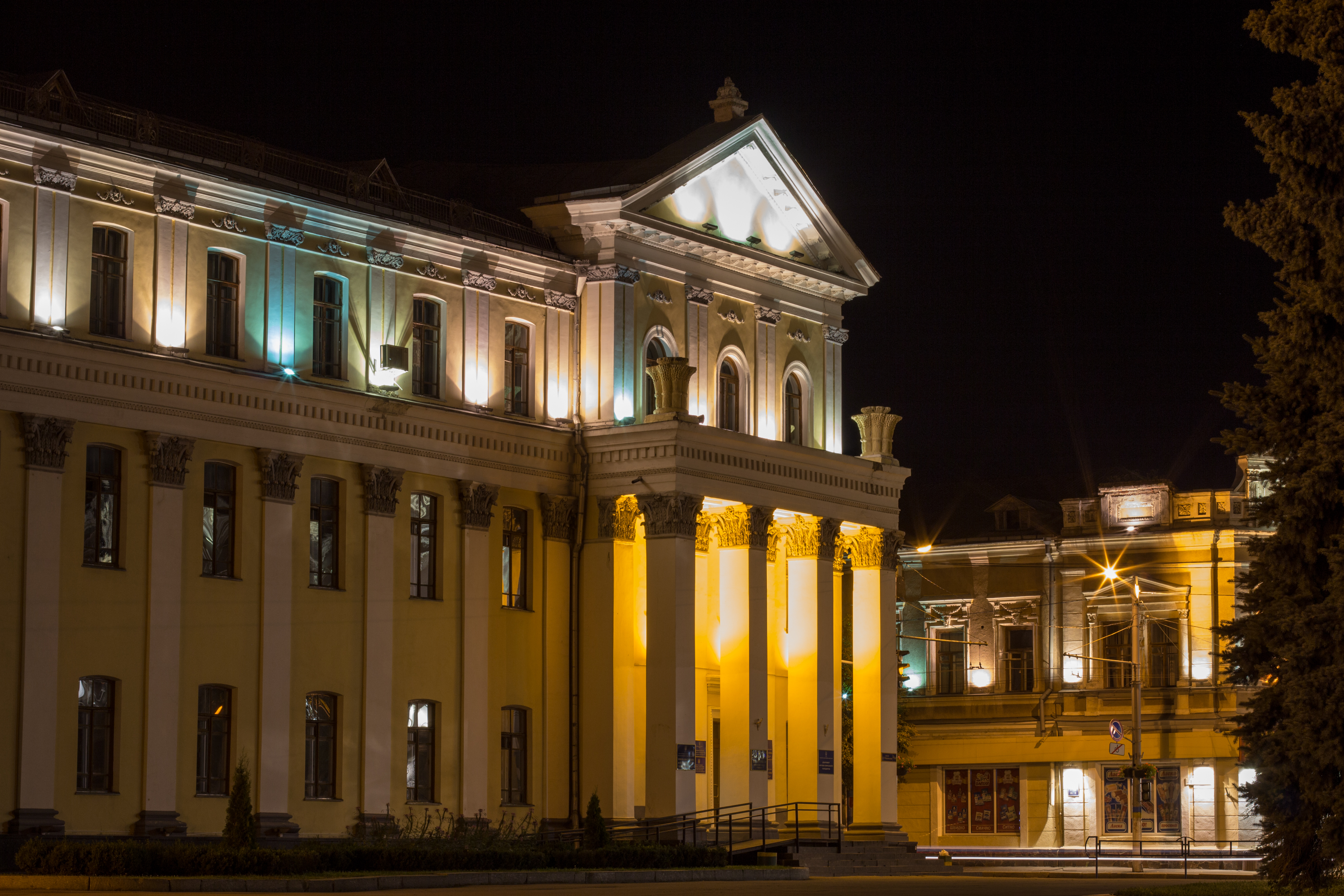 Прибутковий будинок, Житомир, Майдан Корольова , 14